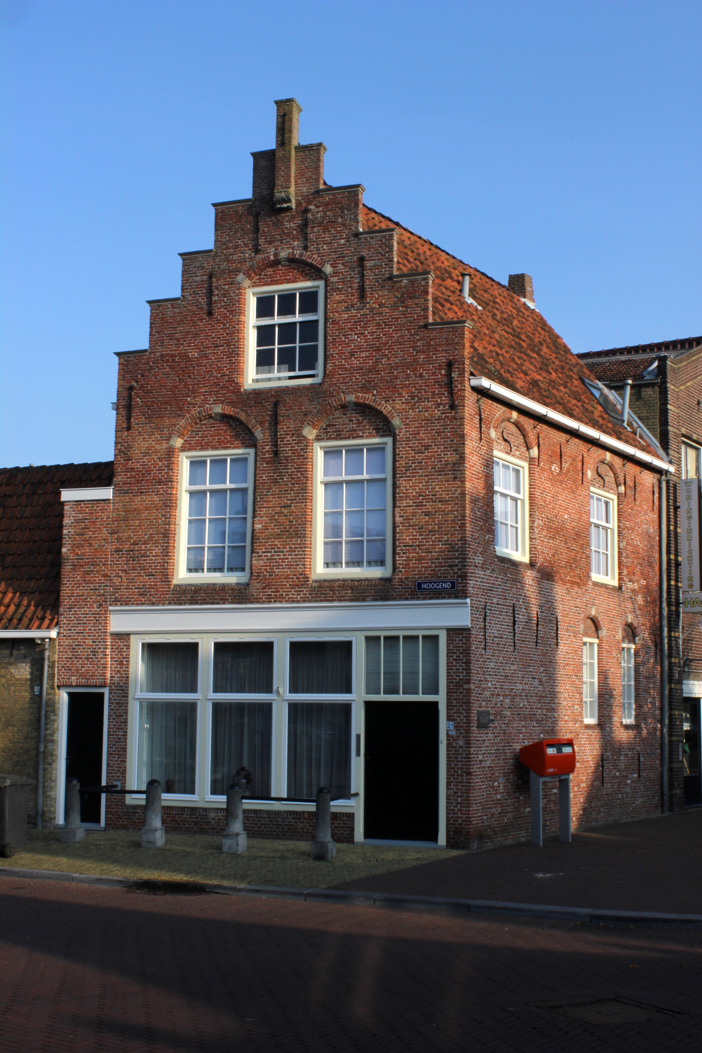 Koopmanswoning met trapgevel.